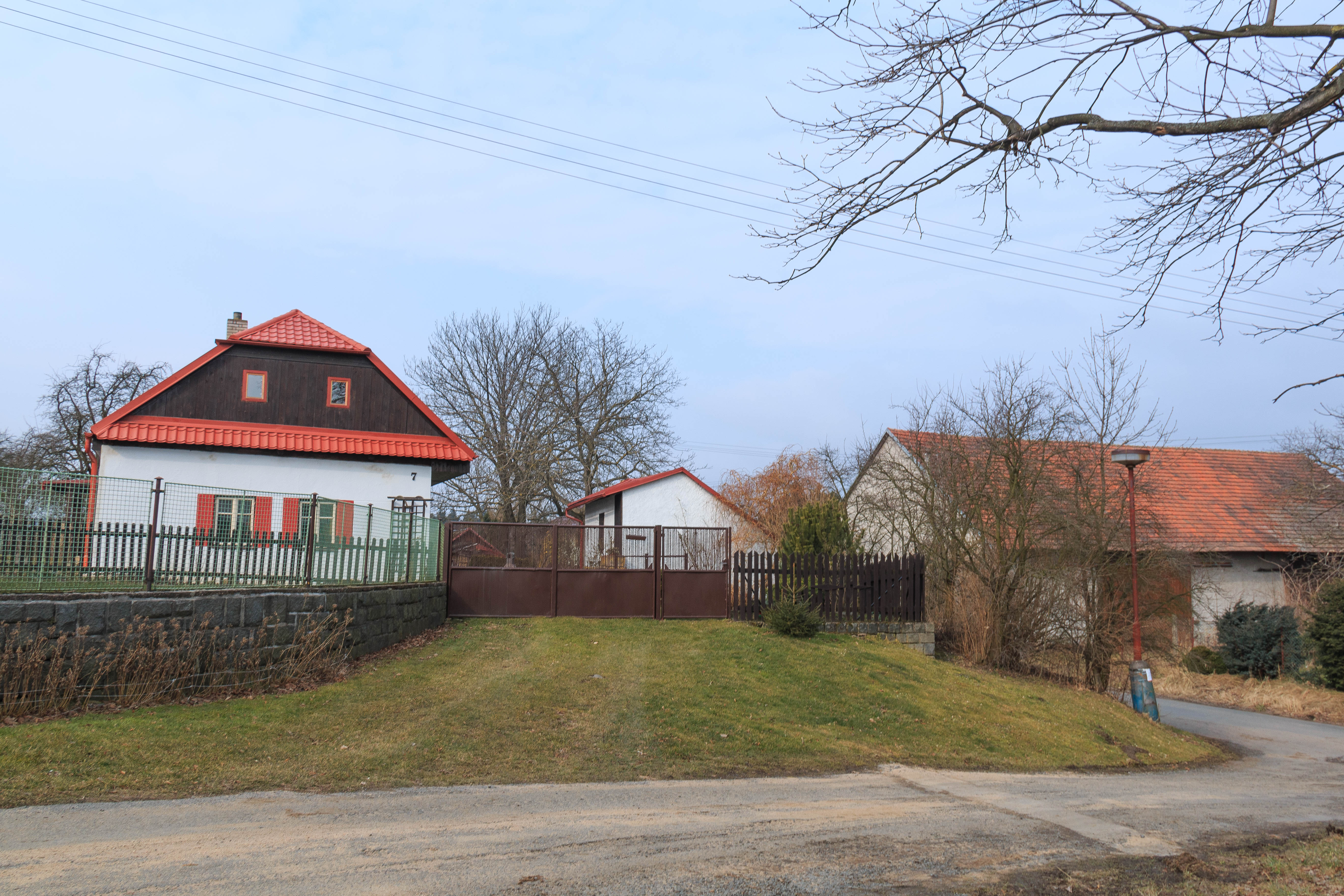 Strkov čp. 7